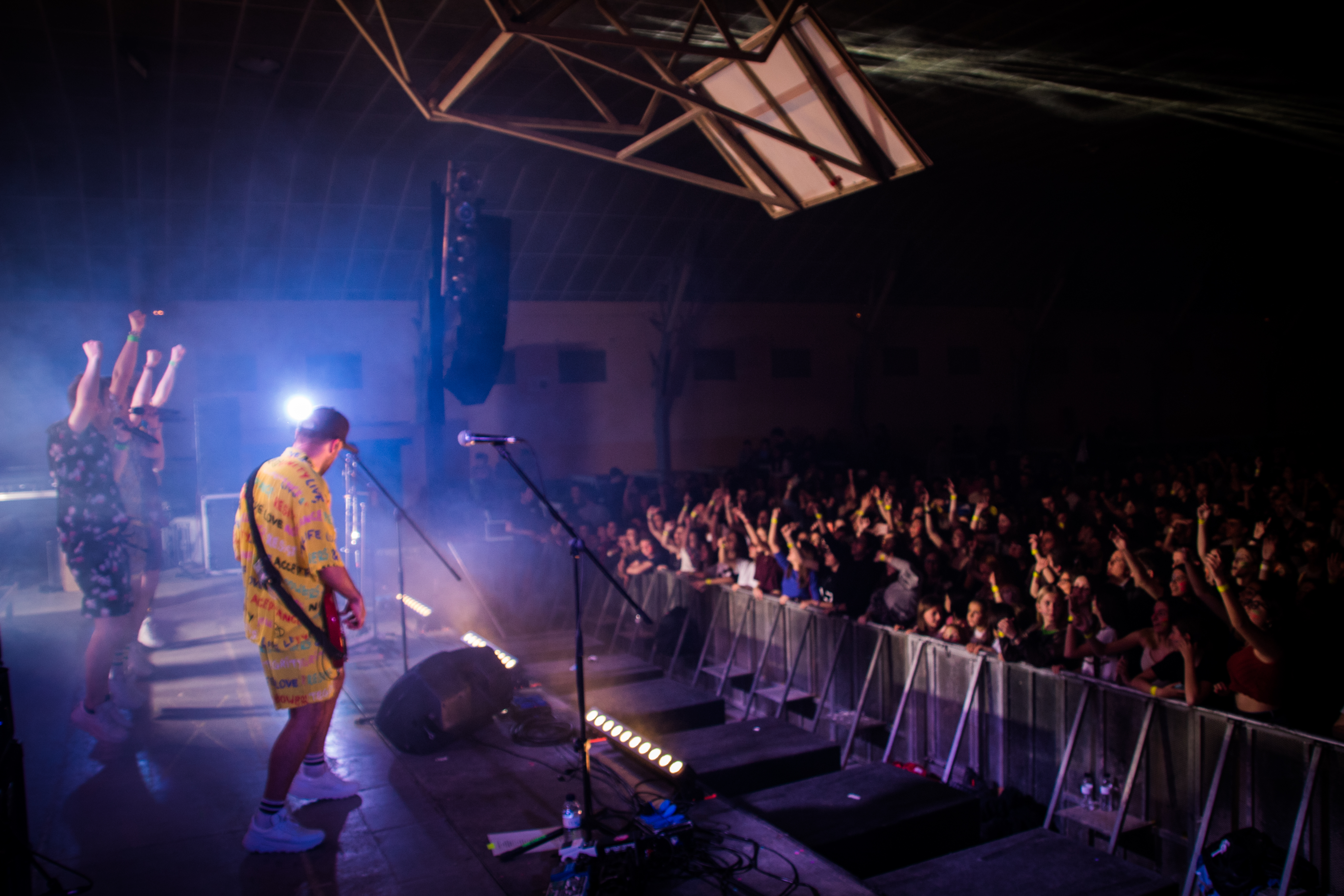 Doctor Prats - Concert Estelada (12)